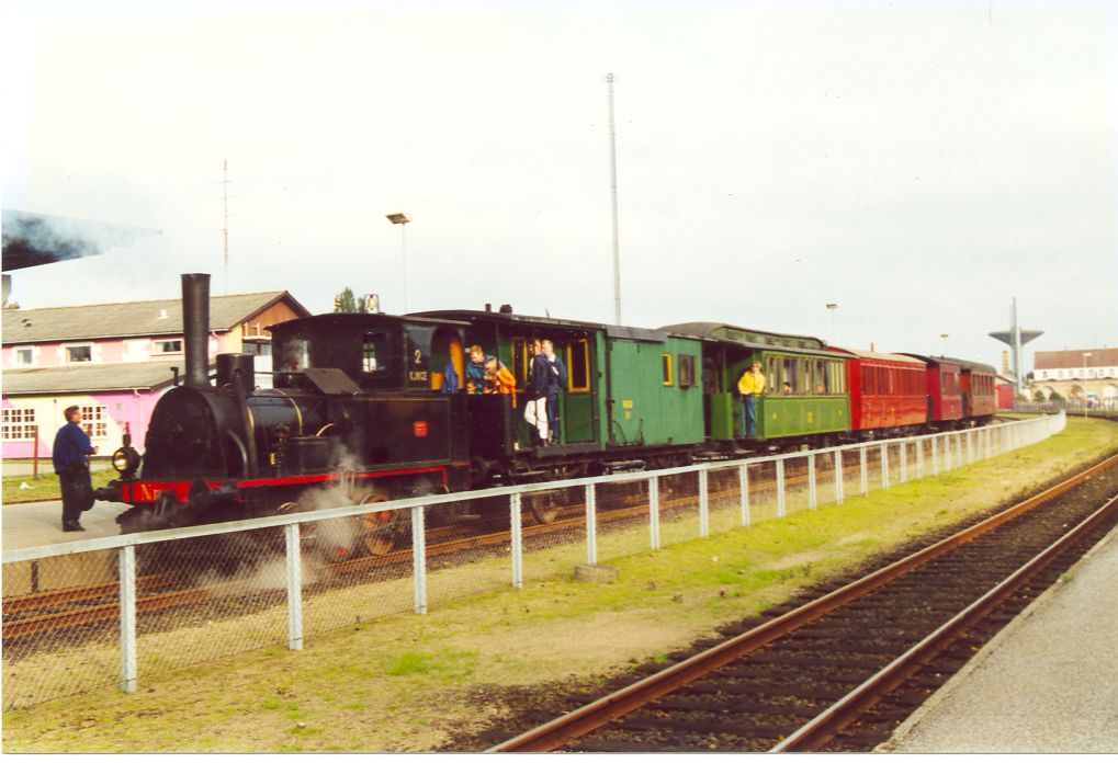 Description: Lok 2 "Kiøge" fährt auf der Museumsbahn Maribo - Bandholm. Am Haken hat sie Wagen verschiedener dänischer Privatbahnen. Der Zug wird zum Betriebswerk hinausgeschoben, ehe es weiter nach Bandholm geht. Author: Olaf Just Source: Olaf Just Date: 18.10.2001